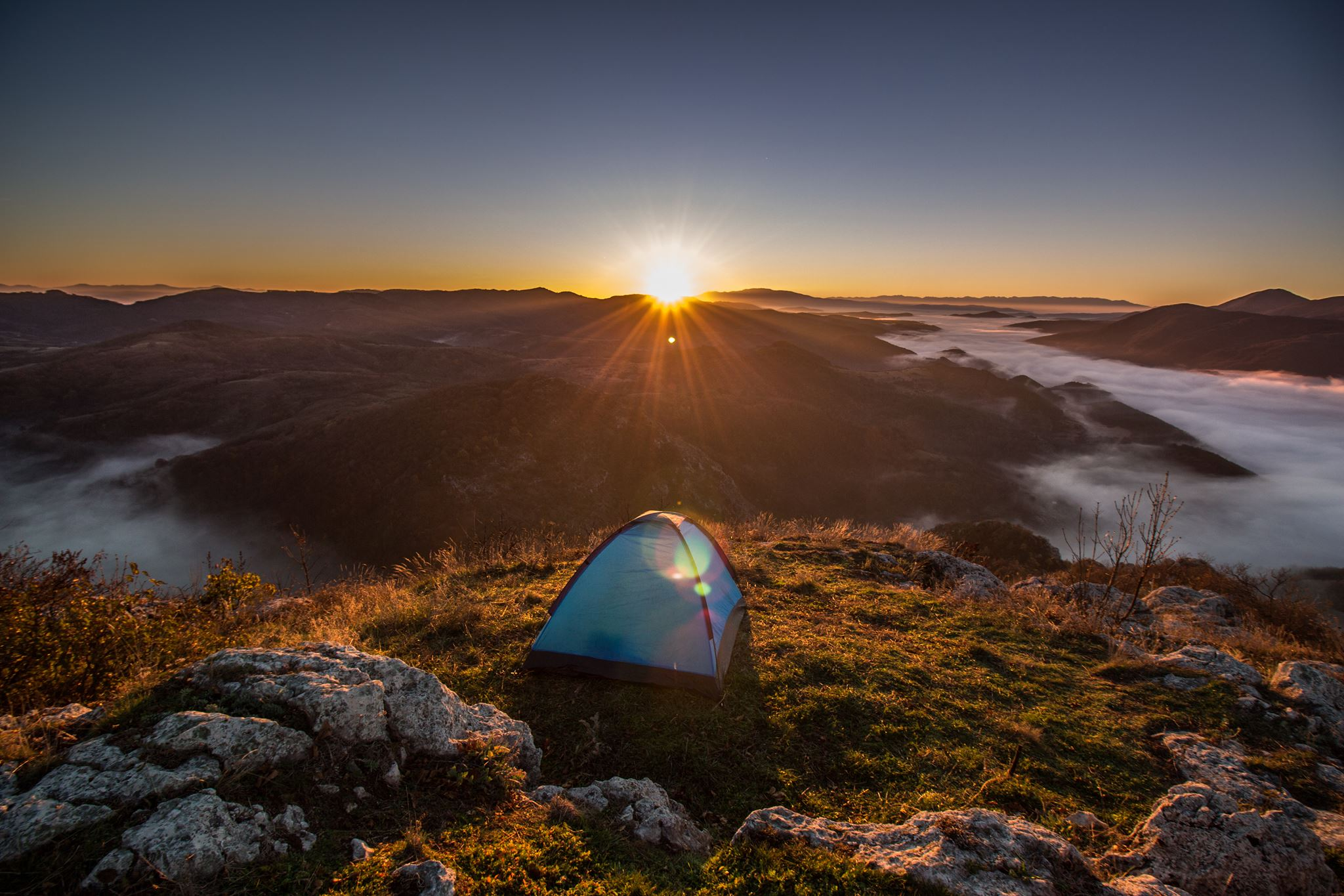 Снимка от върха Драговски камък, Гребен планина заснета от Васил Попов.